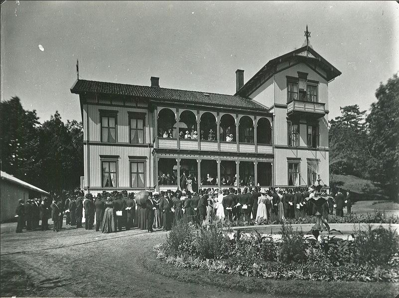 Åpning av Orkerød barnehjem på Jeløya, 1898